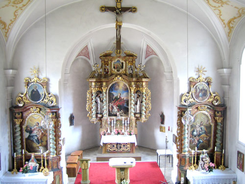 Altar der Kirche Sankt Johann, Stadt Regen